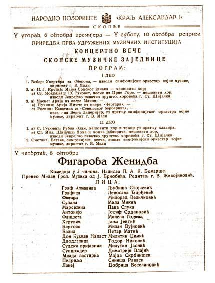 Скопск сцена, 1936